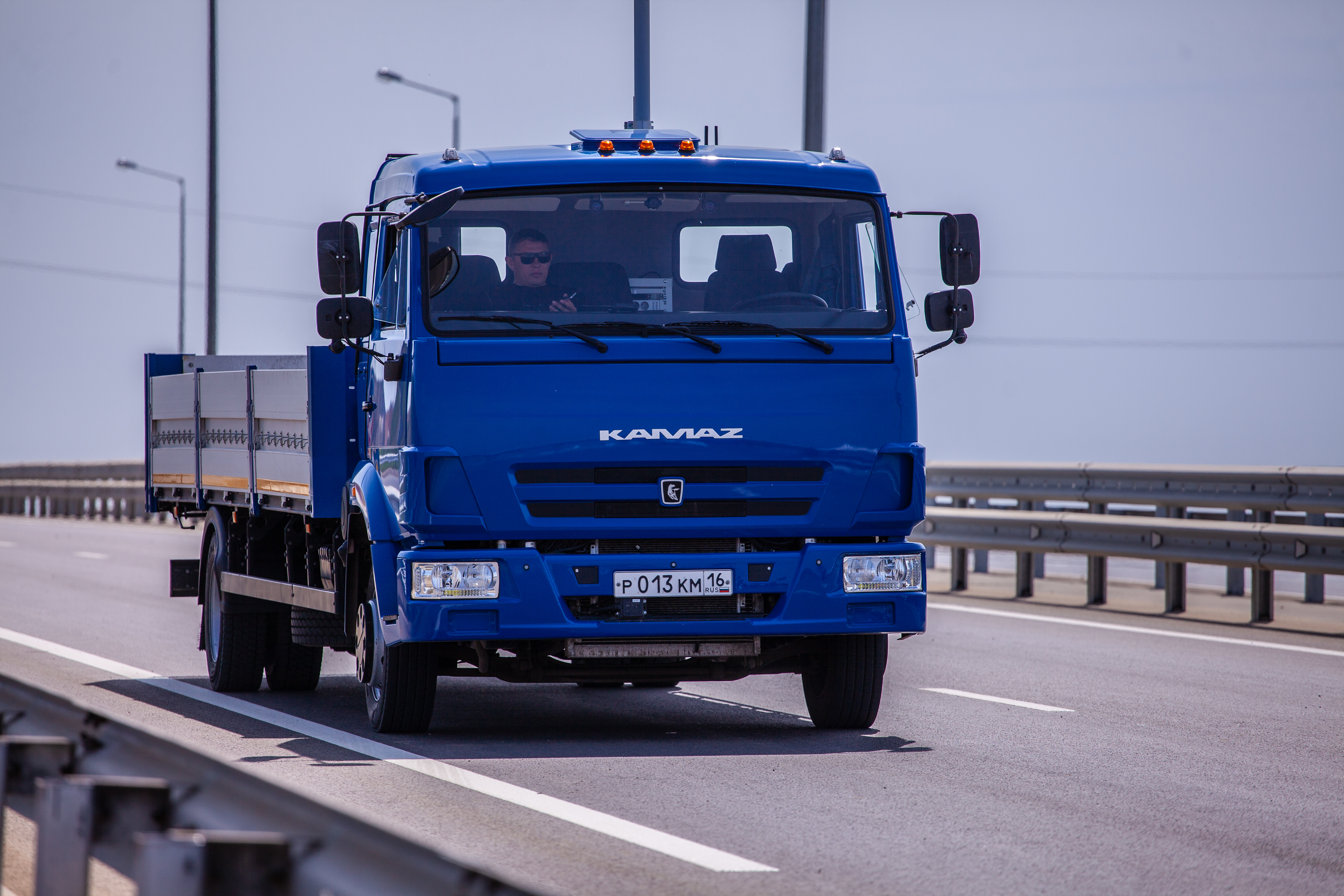 Премьерный тестовый проезд беспилотных автомобилей в России